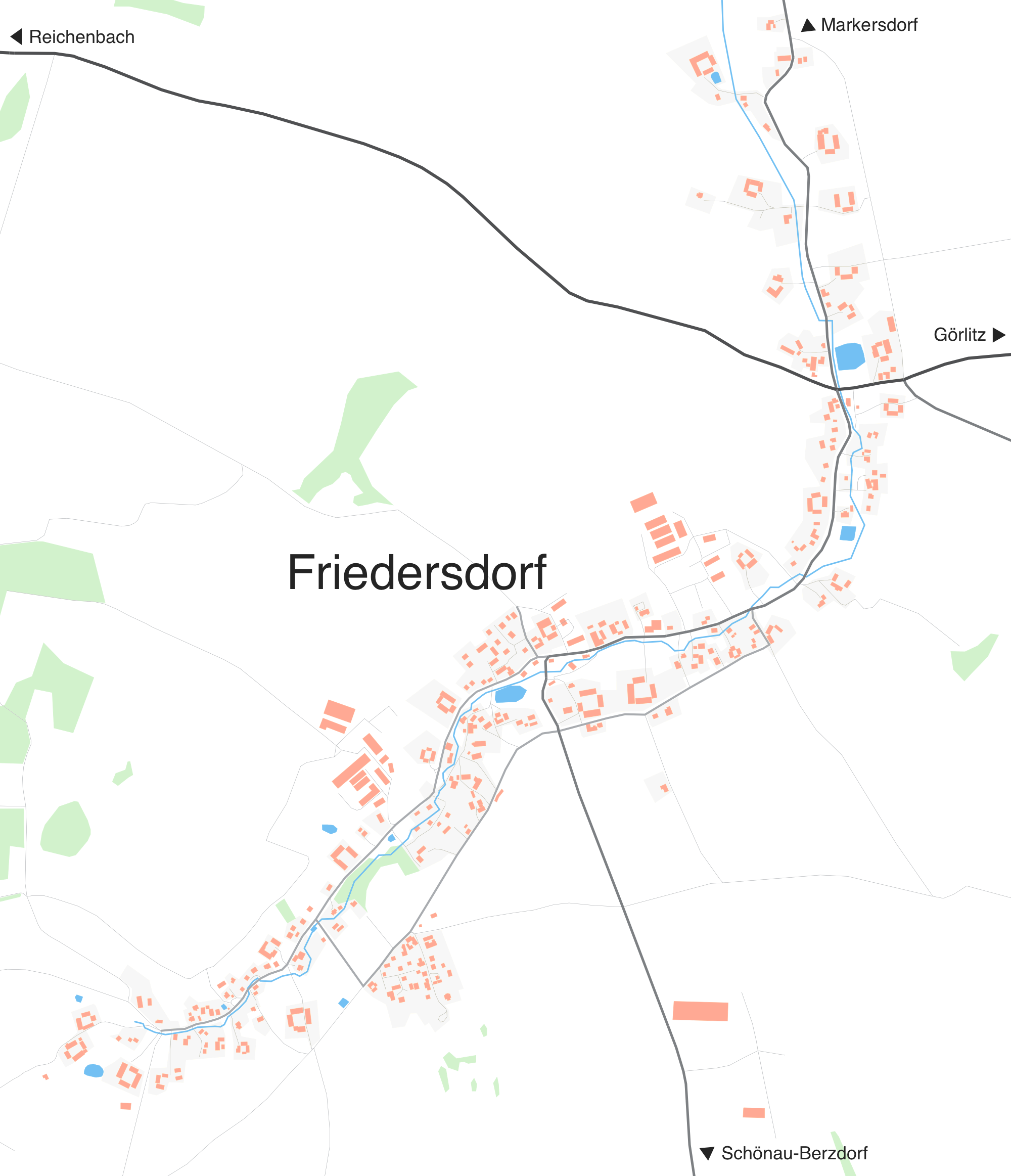 Landkarte des Ortes Friedersdorf (Gemeinde Markersdorf) bei Görlitz. Erzeugt aus Openstreetmap Daten